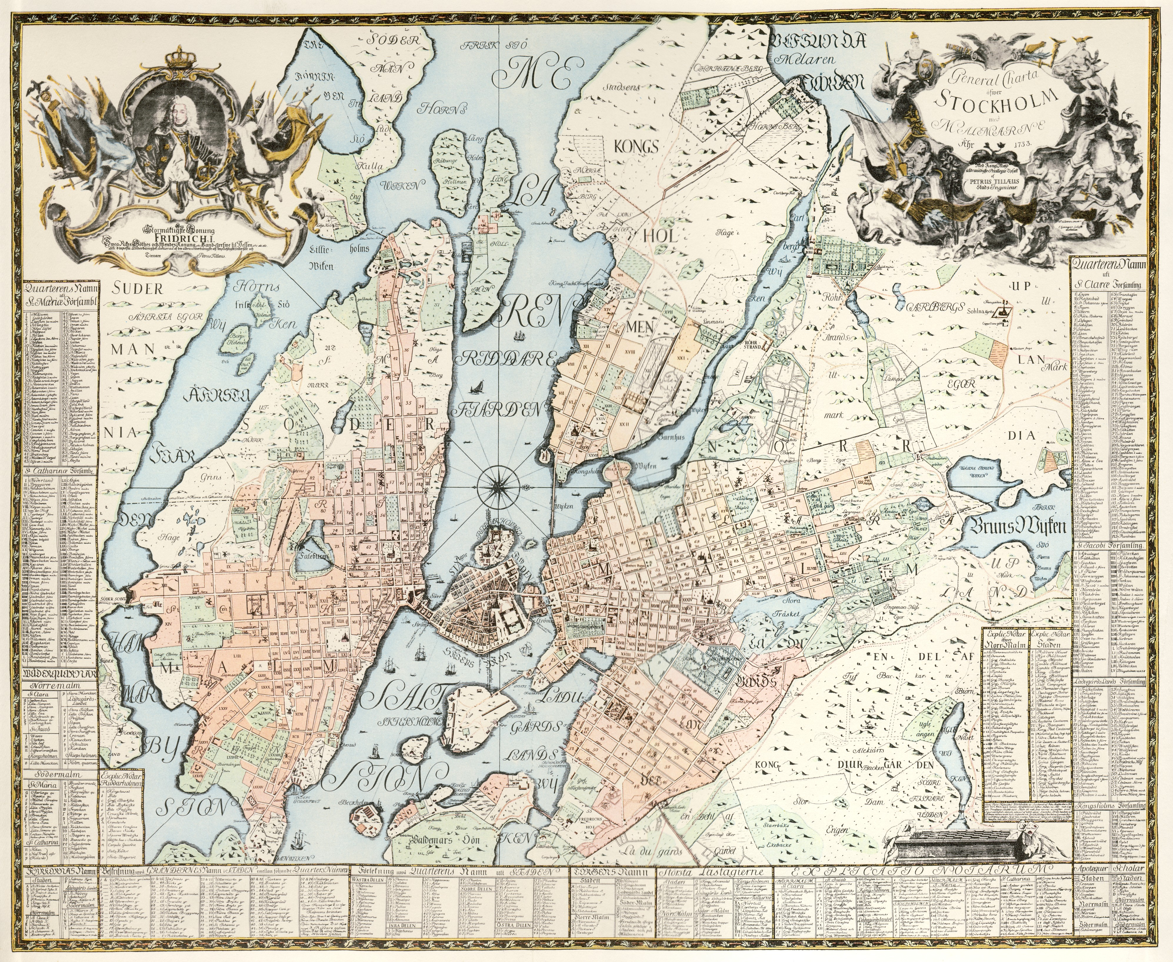 Petrus Tillaeus "General Charta öfwer Stockholm med Malmarne Åhr 1733"